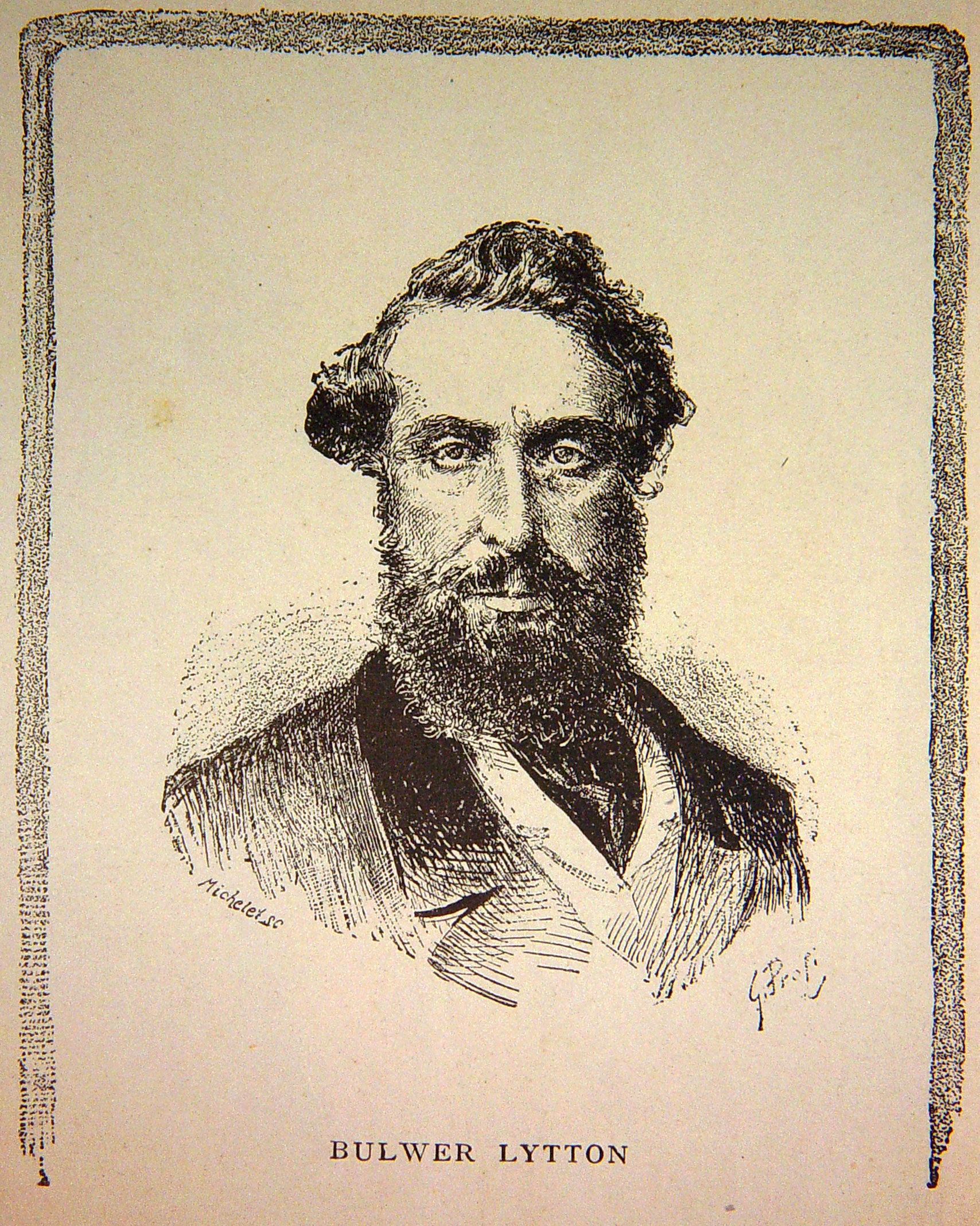 "Bulwer Lytton". Ilustraciones de la obra : Londres, Edimburgo-Dublín / por P. Villars ; traducción de E. L. de Verneuil ; ilustración de Boudier... [et al.] . - Barcelona : Daniel Cortezo, 1886.